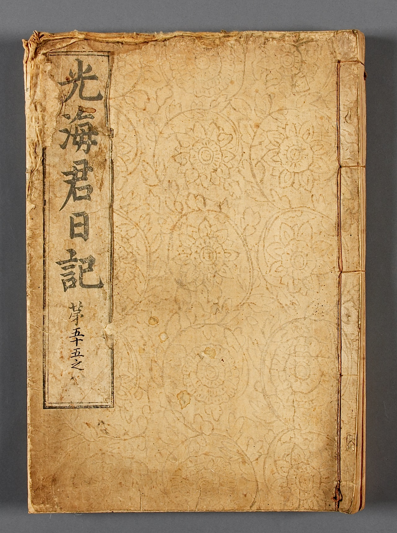 국보 제151-4호 조선왕조실록 적상산사고본 (朝鮮王朝實錄 赤裳山史庫本) - 광해군일기